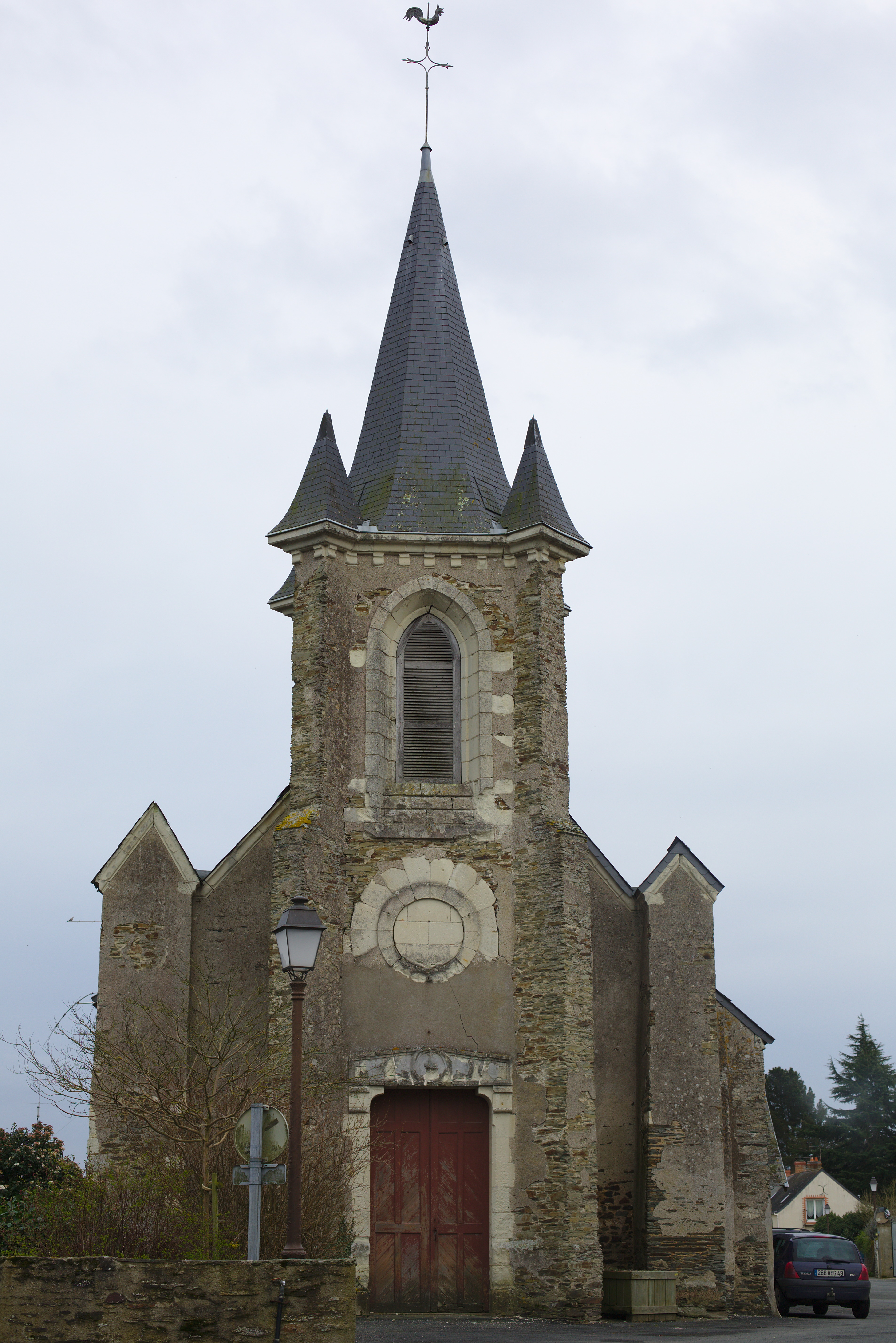 Église de Pruillé.